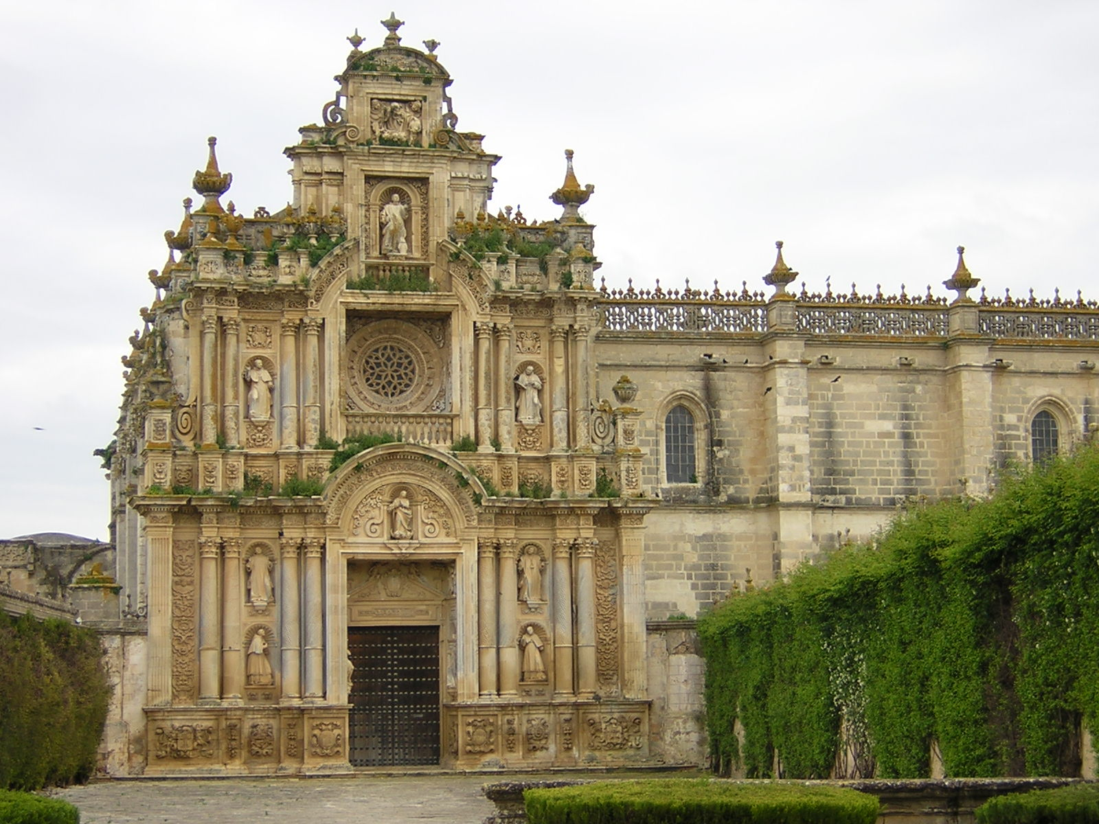 Fachada de la iglesia de la Cartuja de Nuestra Señora de la Defensión (Jerez de la Frontera, España)